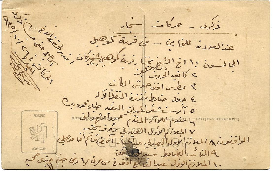 تعليق صالح زكي آل شاكر خلف صورة التقطت في يوم السبت 26 تشرين أول 1935 في ذكرى الحركات العسكرية شمال العراق في قرية كوهبل في سنجار والصورة مهداة إلى أخوه إسماعيل حقي بك آل شاكر، وذكر اسماء الاشخاص في الصورة .